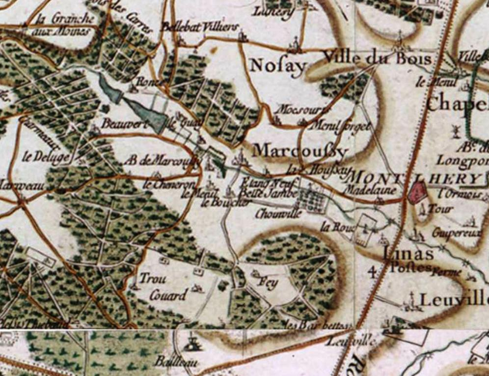 Carte de la région de Marcoussis au XVIIIe siècle par Cassini (Essonne, France)